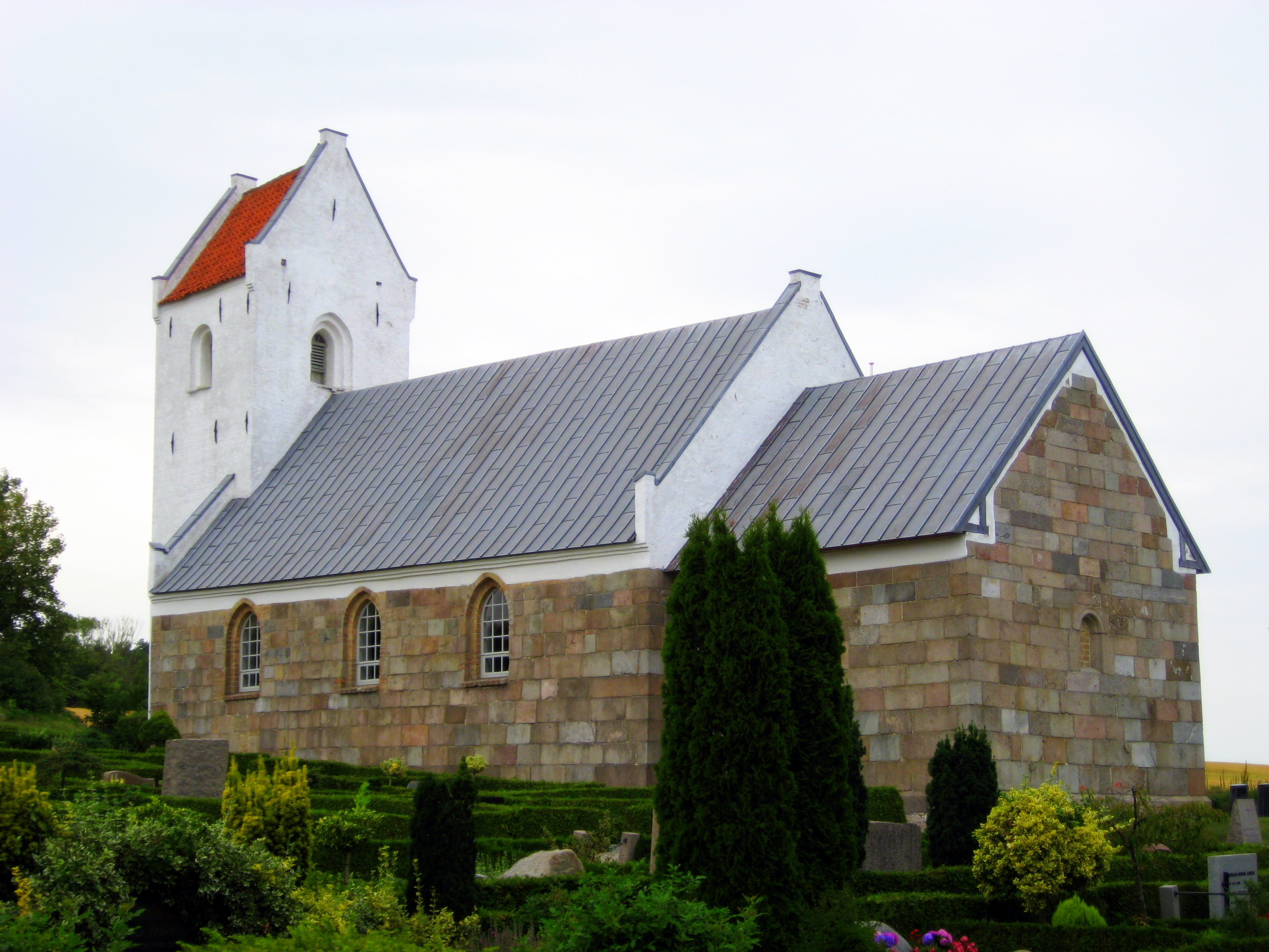 Sejlflod Kirke, Aalborg Kommune